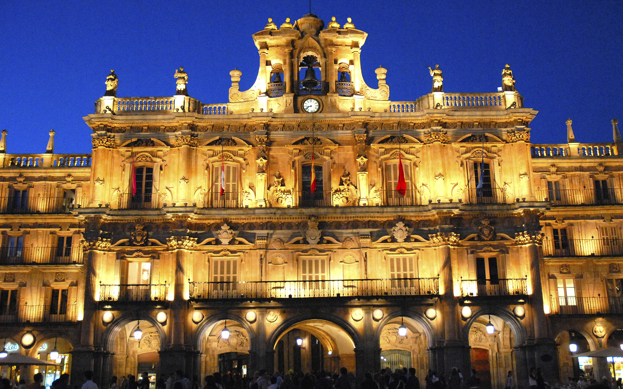 Hotel de ville vu Salamanca owes am Hierscht